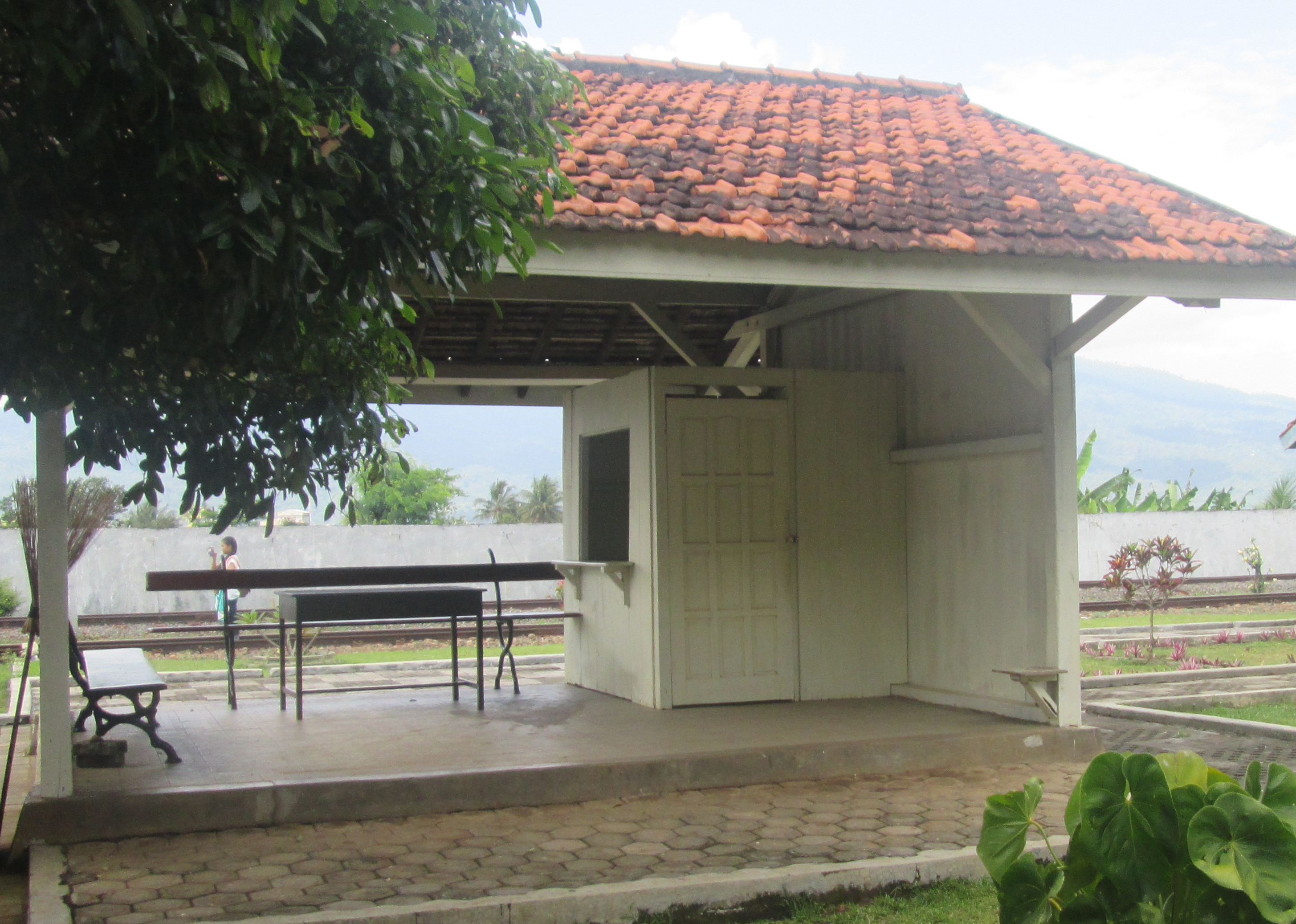 Stasiun Cicayur, telah dipindah ke Museum Kereta Api Ambarawa sejak 2016.